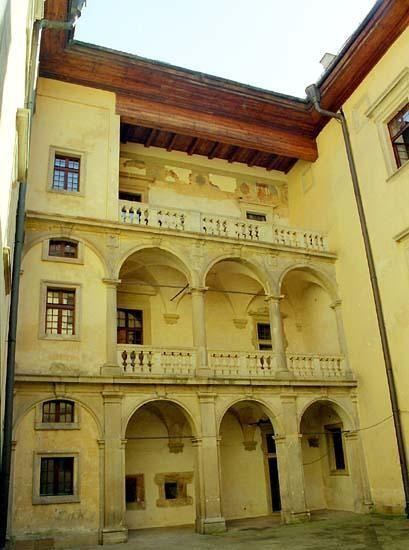 Kaplica na zamku Lubomirskich, Nowy Wiśnicz